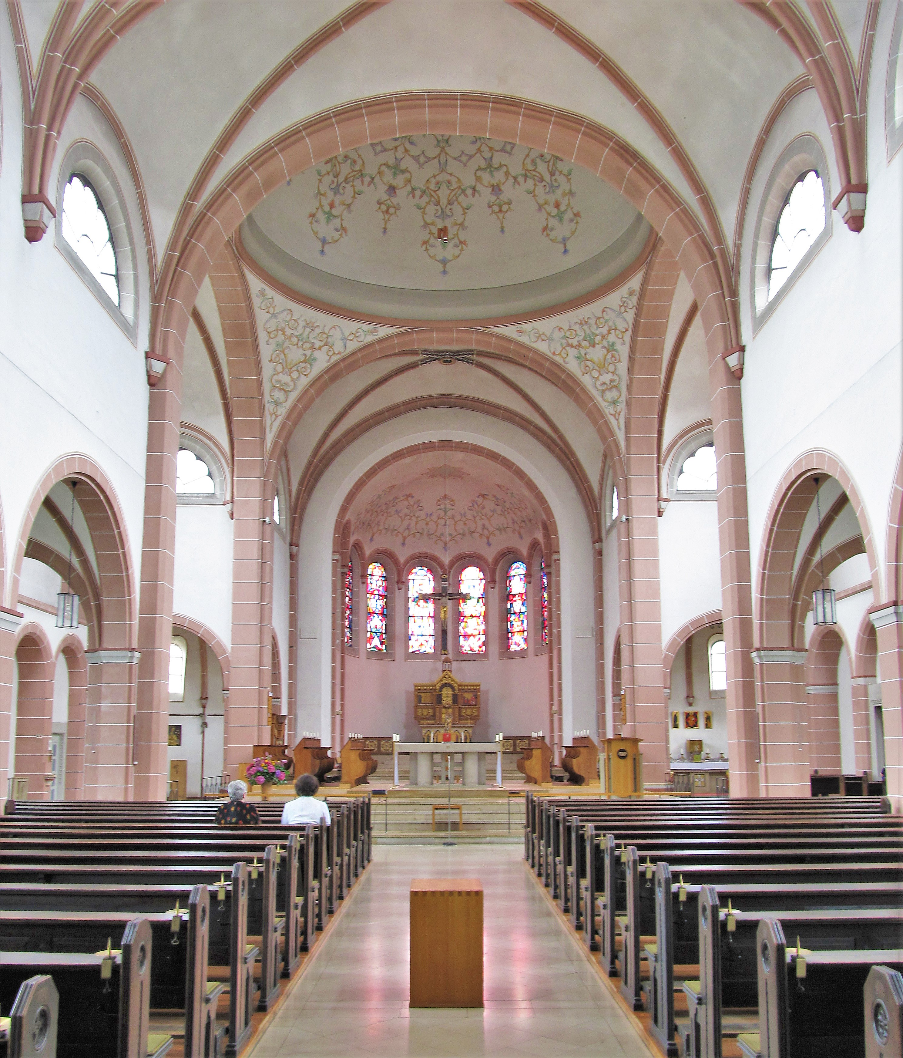 Blick ins Innere der Herz-Jesu-Kirche in Burbach, einem Stadtteil der saarländischen Landeshauptstadt Saarbrücken